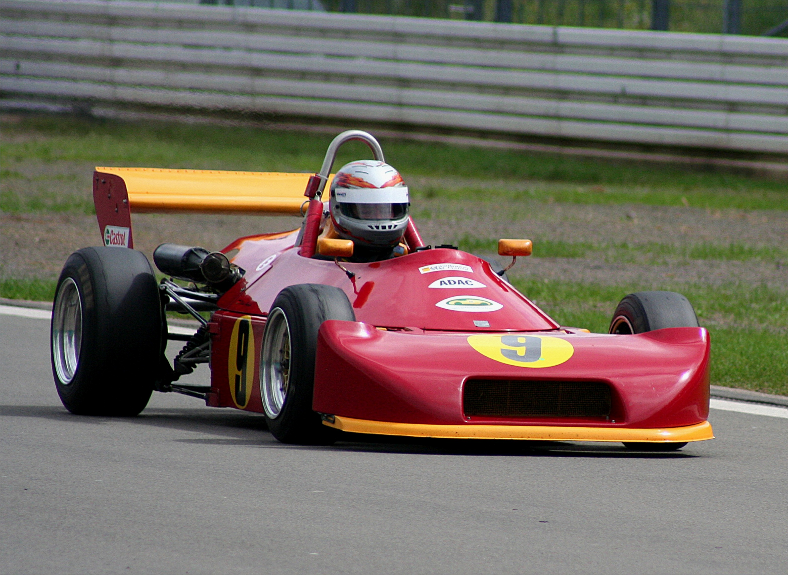 Ralt RT 1 (Formel 3), Baujahr 1976, beim DAMC Oldtimer Festival auf dem Nürburgring (Zielgerade)